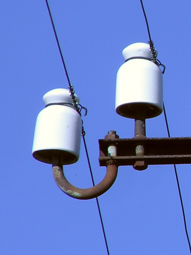 Isolatoren einer Fernsprechfreileitung.